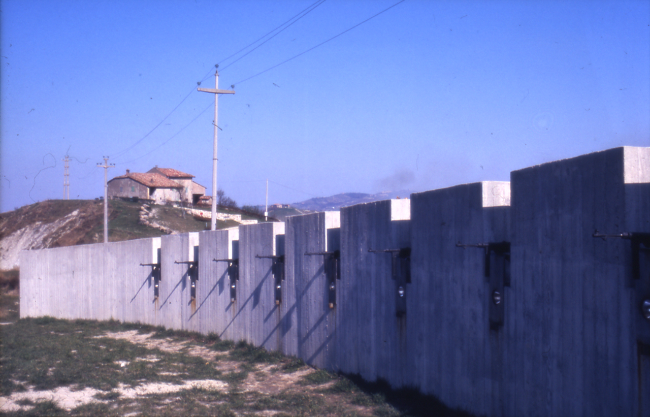 Servizio fotografico : Bologna, 1976 / Paolo Monti. - Foglio: 1, Fotogrammi complessivi: 2/20 : Diapositiva, sviluppo cromogeno/ pellicola ; 35 mm. - ((Sullo chassis della diapositiva n. 01 iscrizione manoscritta "Modena/ Castelli". - Le diapositive nn. 01-15 e 18-20 costituiscono altre serie. - Occasione: Diapositive per audiovisivo Regione Emilia-Romagna. - Fonte: Agenda di Paolo Monti: Diapositive 24x36mm (1948-1982), presso Archivio Paolo Monti. Rubrica con elenco soggetti e numeri di inventario (da 1 a 1000) corrispondenti ai fogli a tasche in pvc in cui sono contenute le diapositive. - Fonte: Agenda di Paolo Monti: IV. Commesse/ Fattura n. 09/ Fotografie monumenti artistici Emilia-Romagna (1976/07/05), presso Archivio Paolo Monti